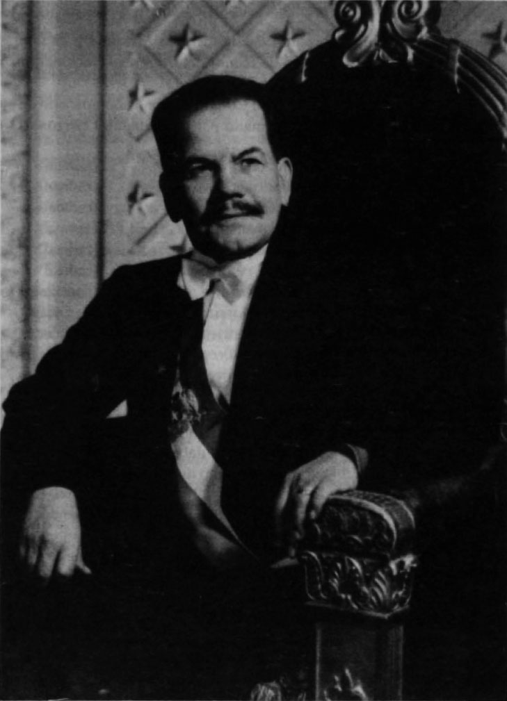 Pedro Aguirre Cerda (Pocuro, 6 de febrero de 1879 — Santiago, 25 de noviembre de 1941) fue un político, abogado y educador chileno. Miembro del Partido Radical, tuvo diversos cargos ministeriales, incluyendo el Ministerio del Interior durante el primer gobierno de Arturo Alessandri Palma. Bajo el lema «Gobernar es educar», Aguirre Cerda fue electo como Presidente de Chile para el período entre 1938 y 1944, en una de las elecciones más ajustadas de la historia republicana.